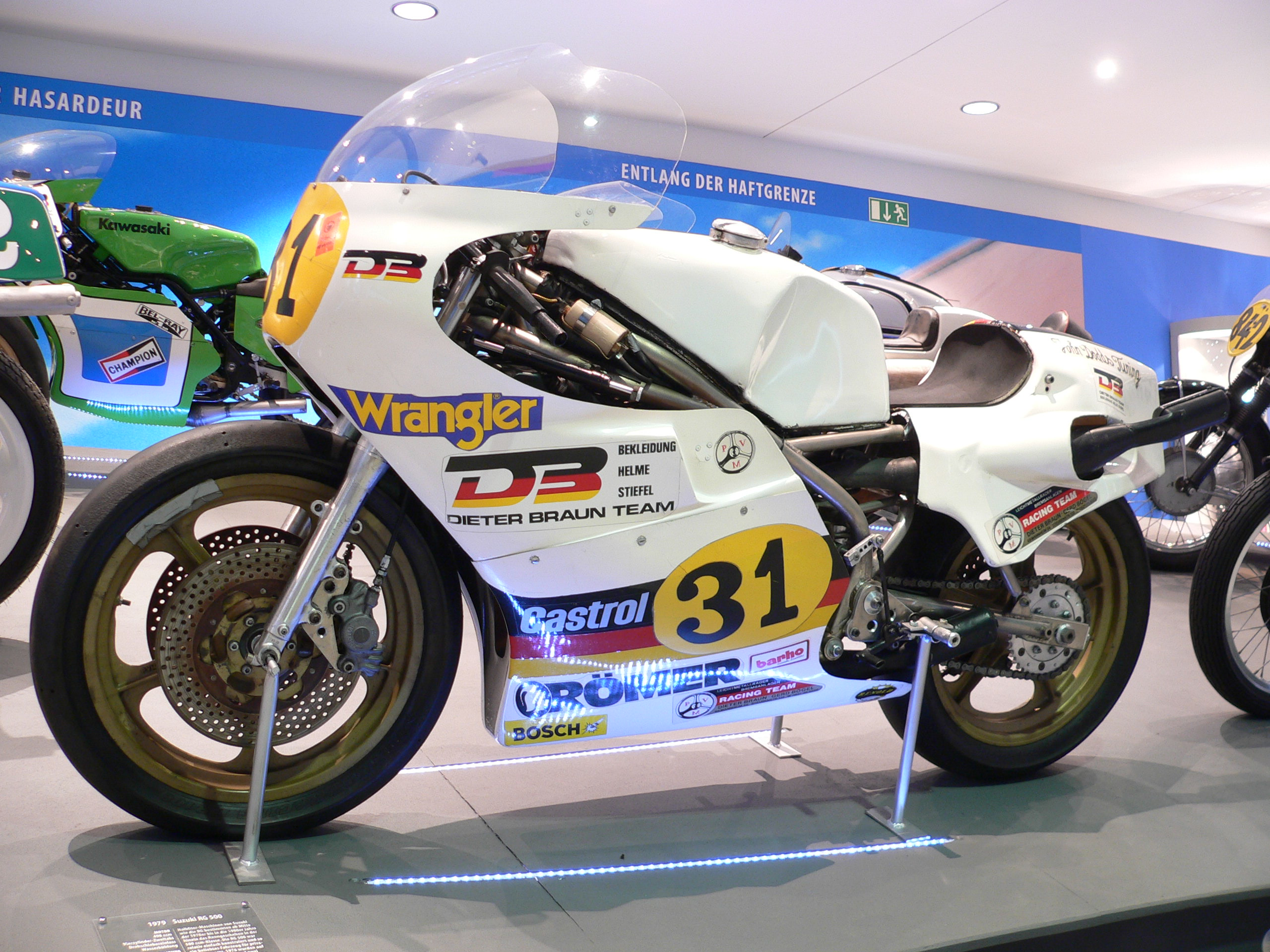 Motorbike "Suzuki RG 500" (1979) at the Deutsches Zweirad- und NSU-Museum (498 cm³, Vierzylinder-Zweitakt-Motor, 118 PS bei 11.600 U/min., 275 km/h)